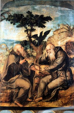 "Santo Antão e São Paulo Eremita", juntamente com "Pregação de São João Baptista", "São Jerónimo", "Visão de Santo Antão" e "Santo Antão e o Sátiro", forma um conjunto designado por "série dos arcos" devido à arcaria que se rasga sobre um fundo azul e que corre a parte inferior de todos os painéis. O "Retábulo do Mestre dos Arcos", nome pelo qual também é conhecido, não foi ainda objecto de um estudo aprofundado, com a excepção da contribuição de Luís Reis-Santos que atribuíu a autoria dos quadros a Gregório Lopes, o que, contudo, não deixa de levantar alguns problemas, uma vez que estas pinturas não se enquadram plenamente no estilo do pintor. Este quadro, tal como os restantes quatro painéis que compunham o conjunto da "série dos arcos" provêm do Convento de São Bento da Saúde, embora tudo indique que não seriam originários desta instituição beneditina, uma vez que apenas foi construída em 1598, ou seja, numa data posterior à da feitura dos quadros.